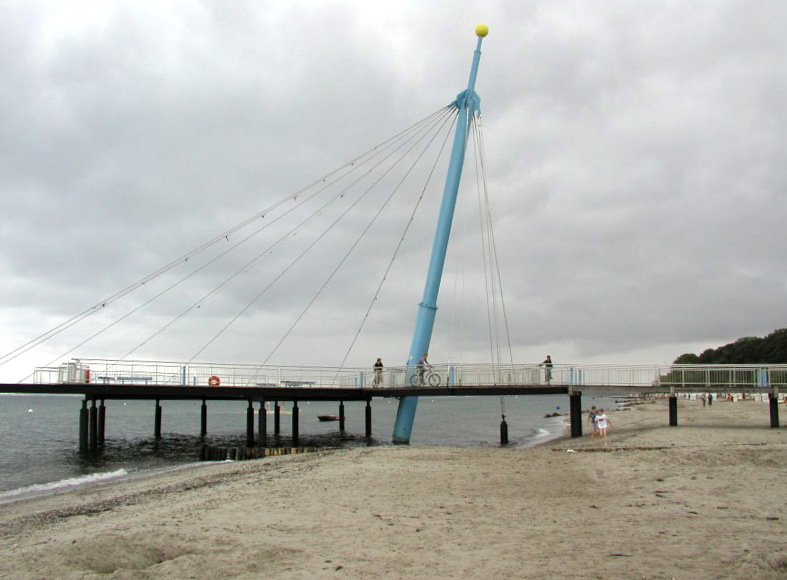 Foto der Seebruecke in Hohwacht, an der Ostsee. Foto selbst gemacht.